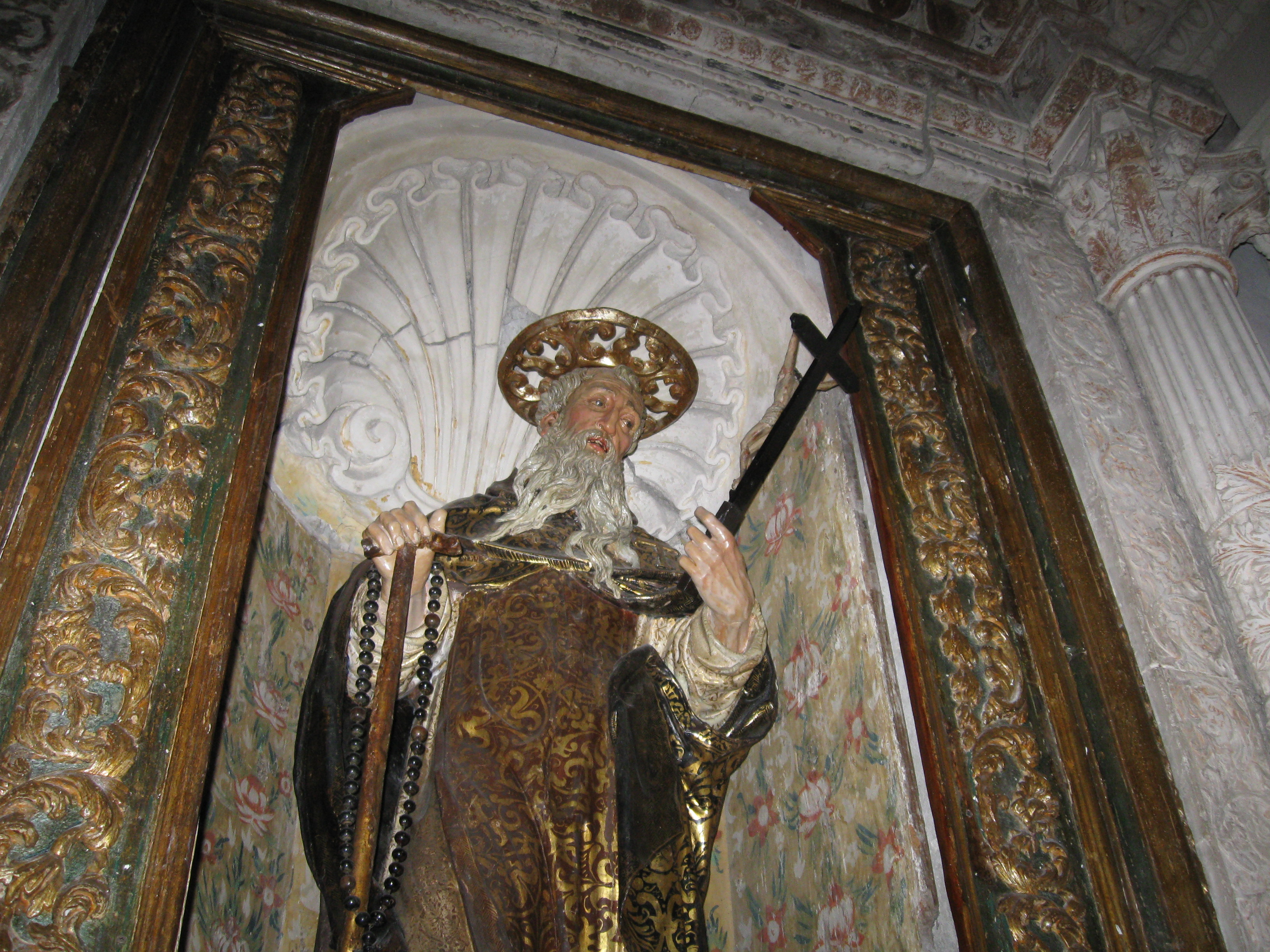 Il simulacro di Sant'Antonio abate compatrono di Licodia Eubea in provincia di Catania.